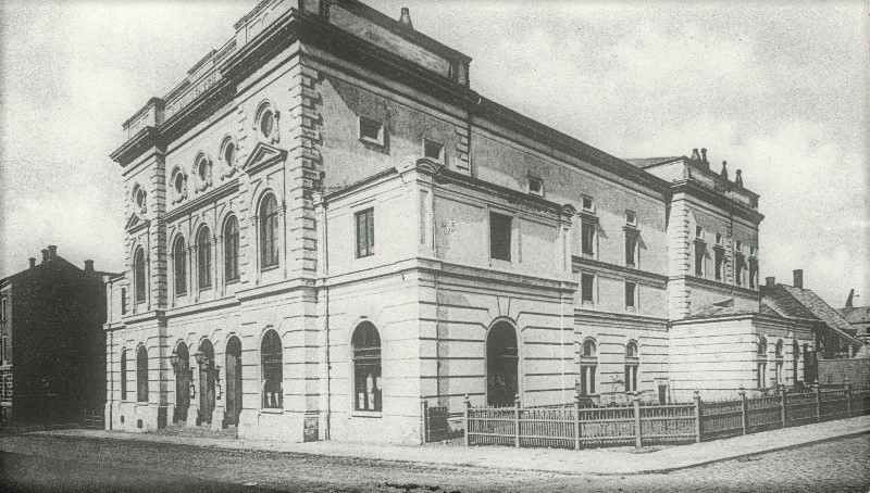 Gamla stadsteatern på kvarter Thalia i Helsingborg omkring år 1888.